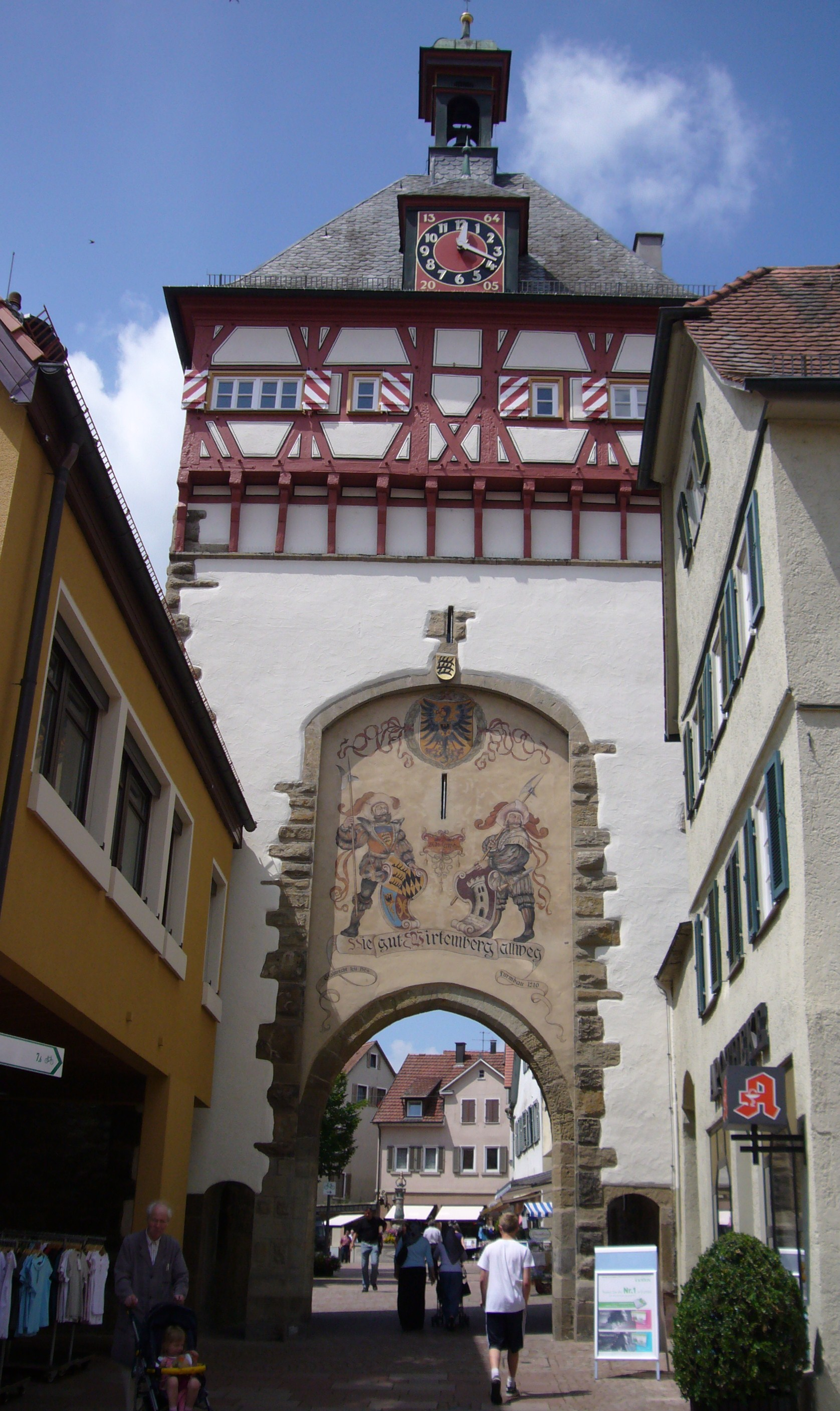 Unteres Tor in Bietigheim-Bissingen, Ansicht von "außerhalb"